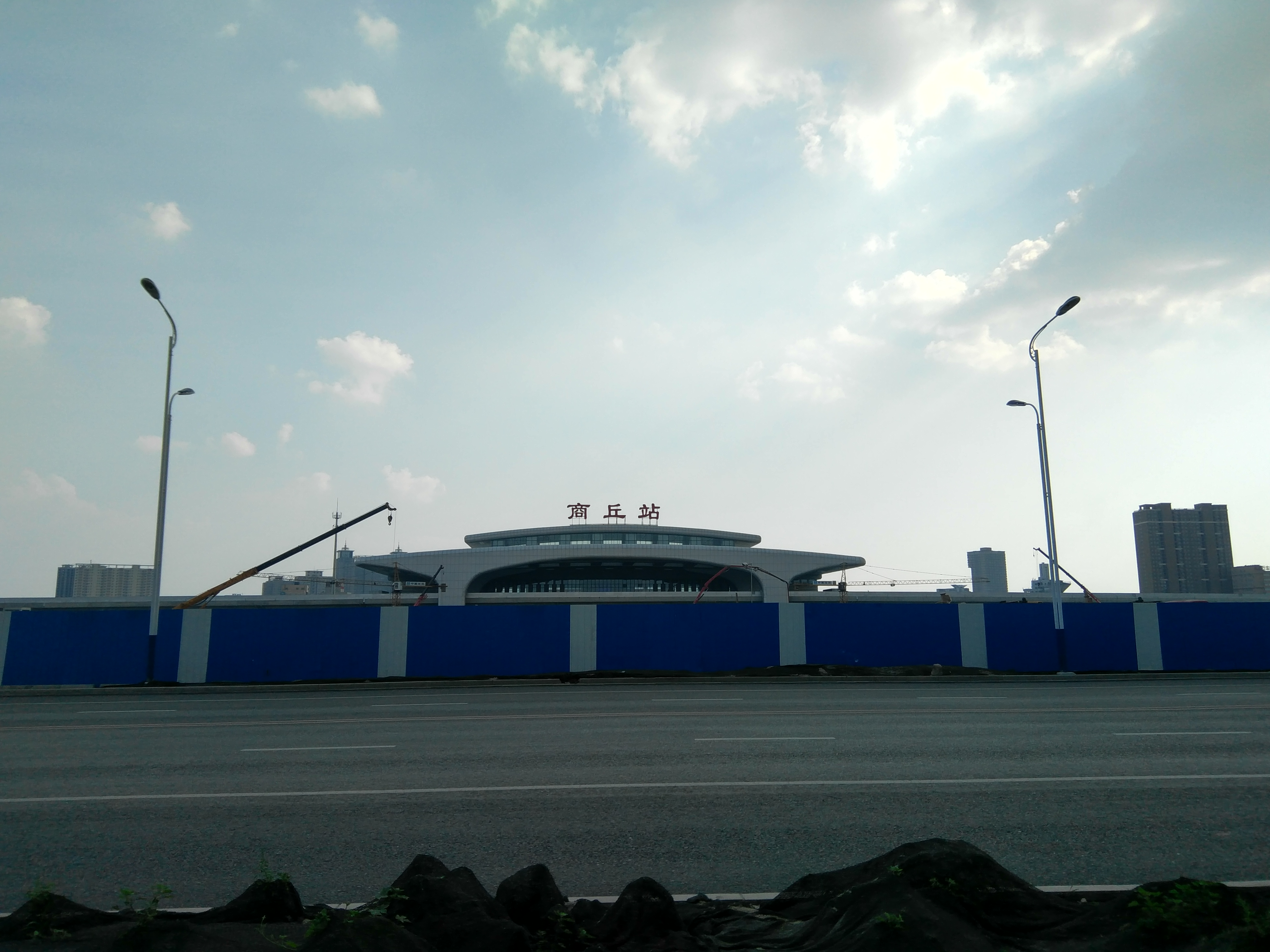 商丘站北站房